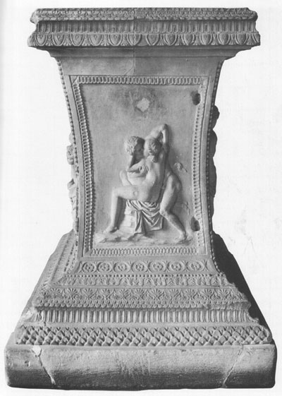 Ara Grimani, fine I sec. a.C. Venezia, Museo Archeologico